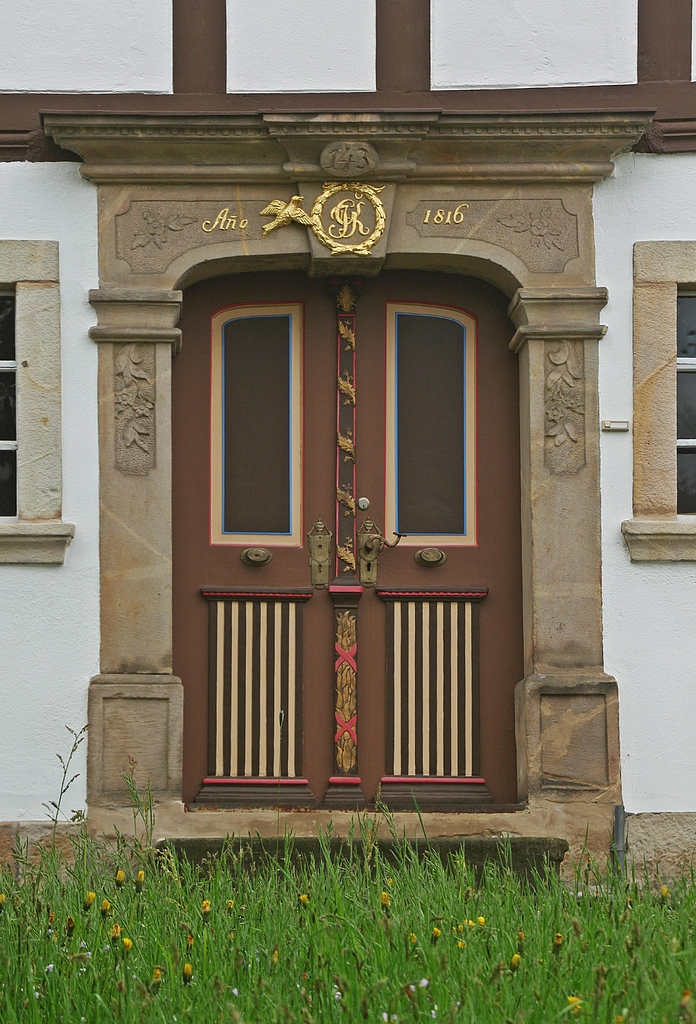 Waltersdorf (Großschönau): Blick auf das Portal des Umgebindehauses Hauptstraße 35 (Denkmal-Nr. 09270716).